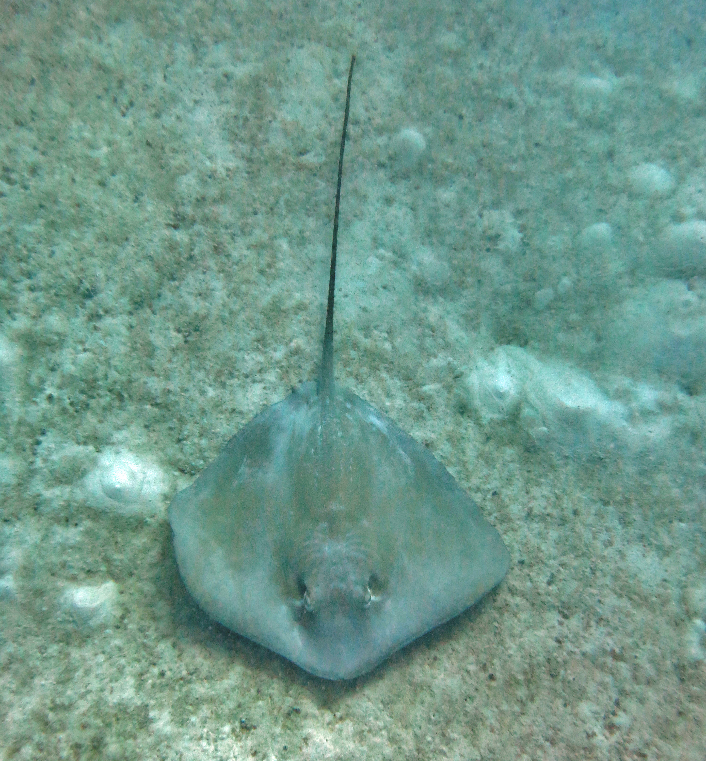 Une Raie de Jenkins (Pateobatis jenkinsii, ex-Himantura) aux Maldives (Fonimagoodhoo, atoll de Baa).